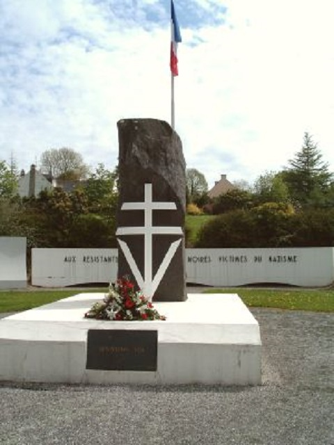 Gourin (Morbihan) : le Monument aux résistants des Montagnes Noires (porte 59 noms)